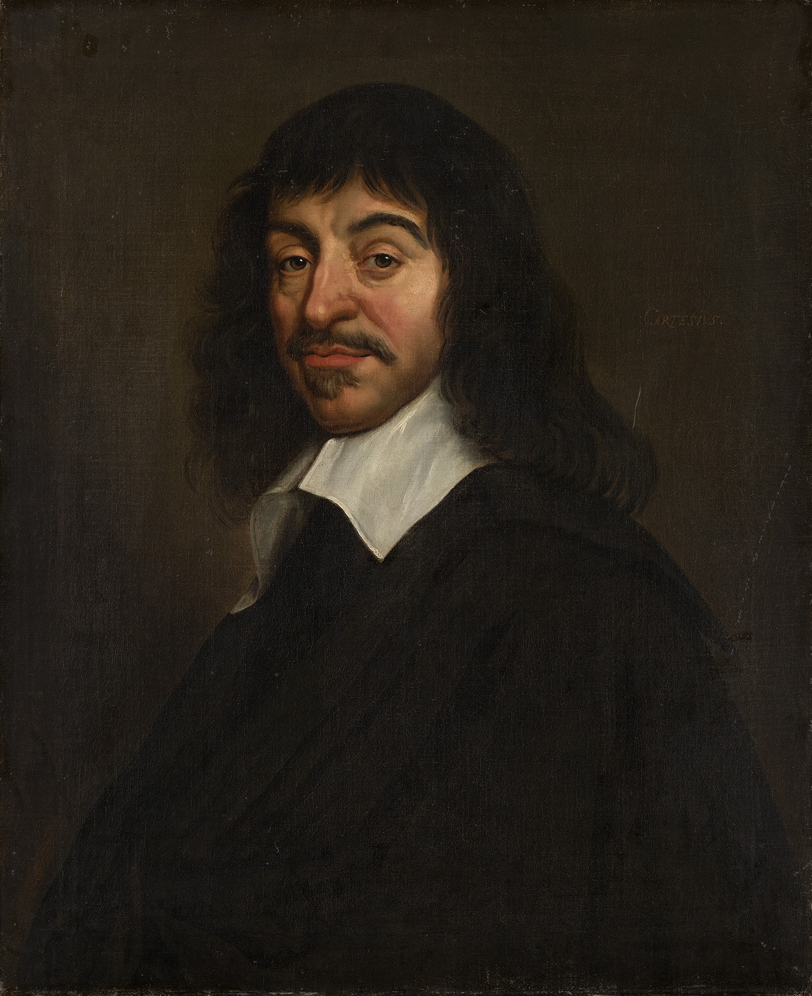 schilderij; migratie; Frankrijk; portret; mansportret; Descartes, René